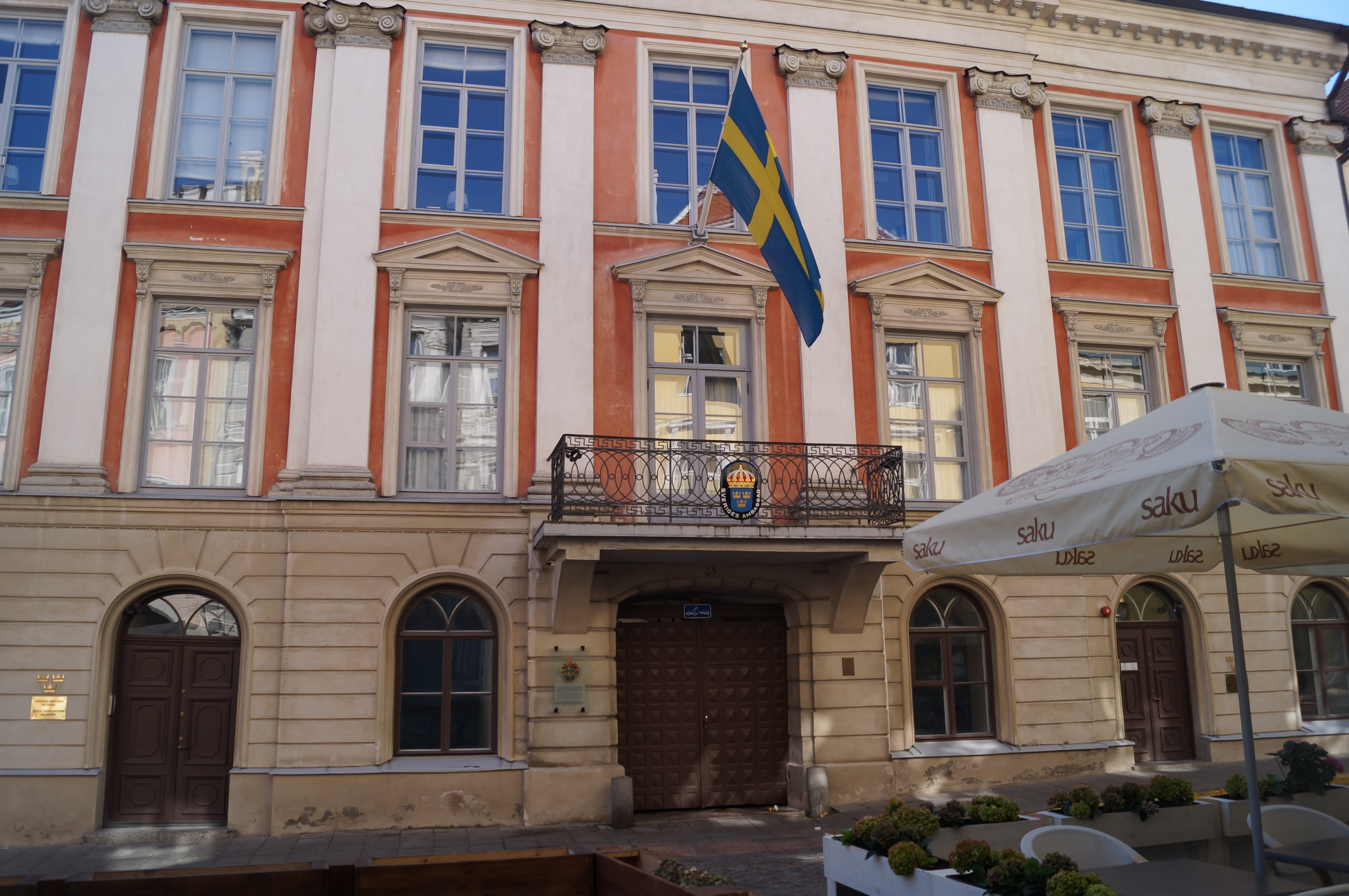 Tallinn old town